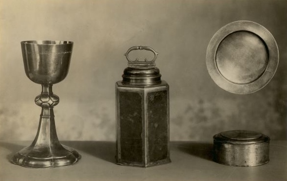 Garnisonsregementet i Göteborgs nattvardskärl, bestående av kalk, paten, oblatask, samt behållare för vin. Bild från 1924.